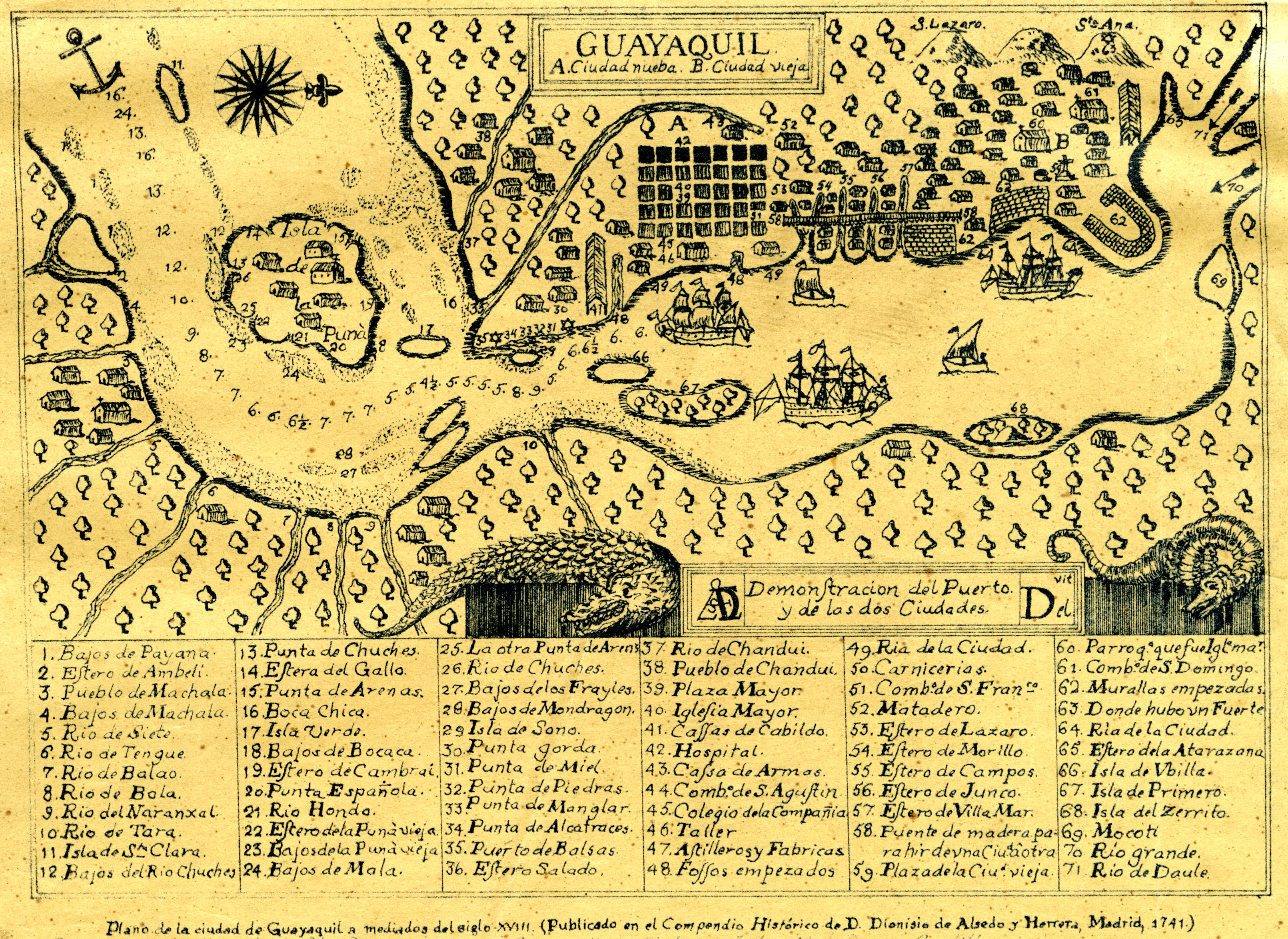 Diapositiva de acceso público consultada del ejemplar original que se custodia en los Fondos Bibliográficos y Cartográfico (Sección: Historia de Guayaquil) del Archivo Histórico del Guayas - Guayaquil, Ecuador.Consultado y compartido por el usuario J. Javier García A.